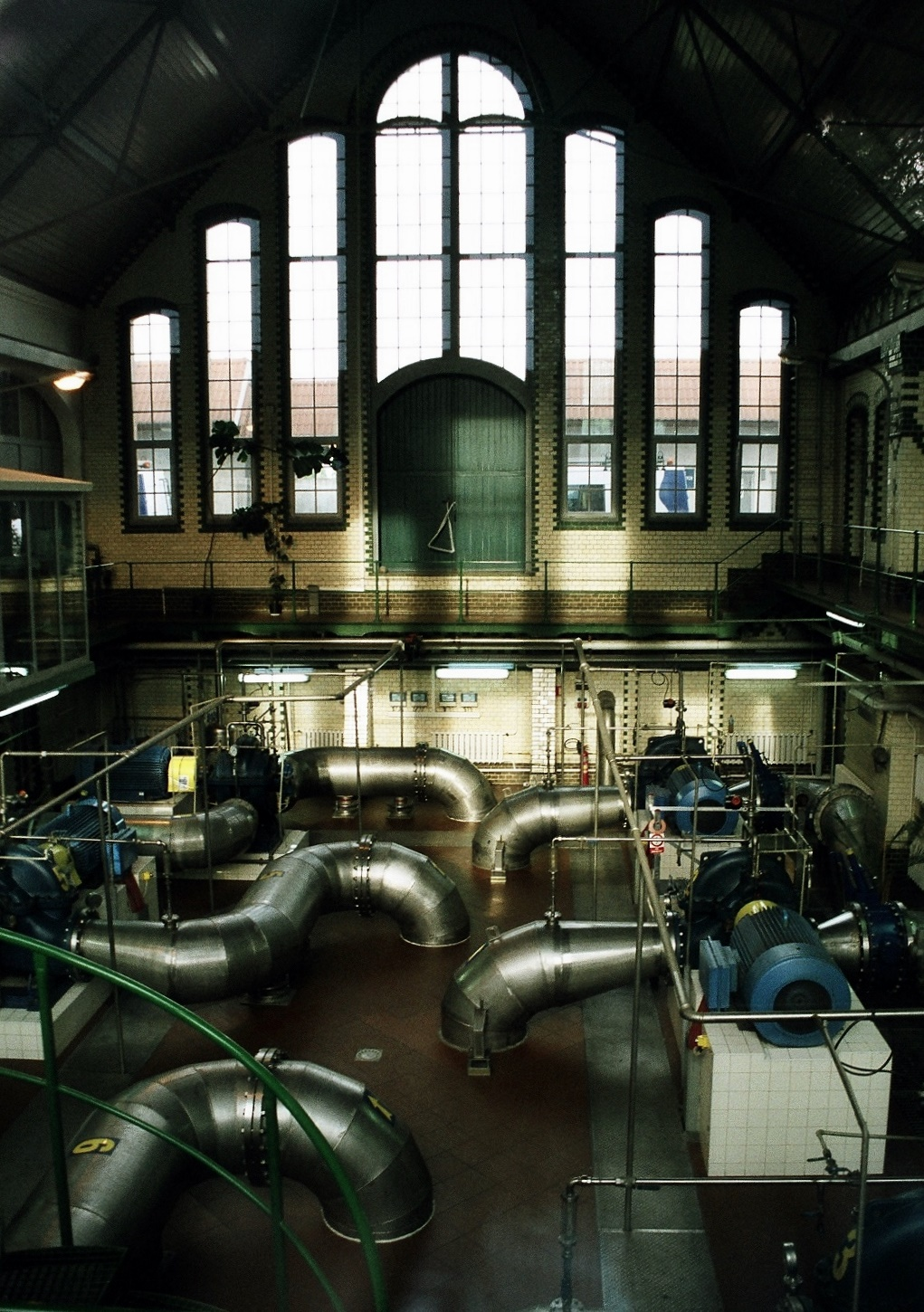 Poznań, ul. Garbary 120 - wnętrze głównej hali stacji pomp (zabytek nr A 268)